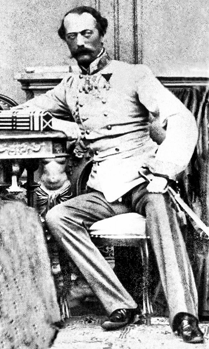 Feldzeugmeister Wilhelm Lenk von Wolfsberg,um 1865, damals Generalmajor, Ausschnitt